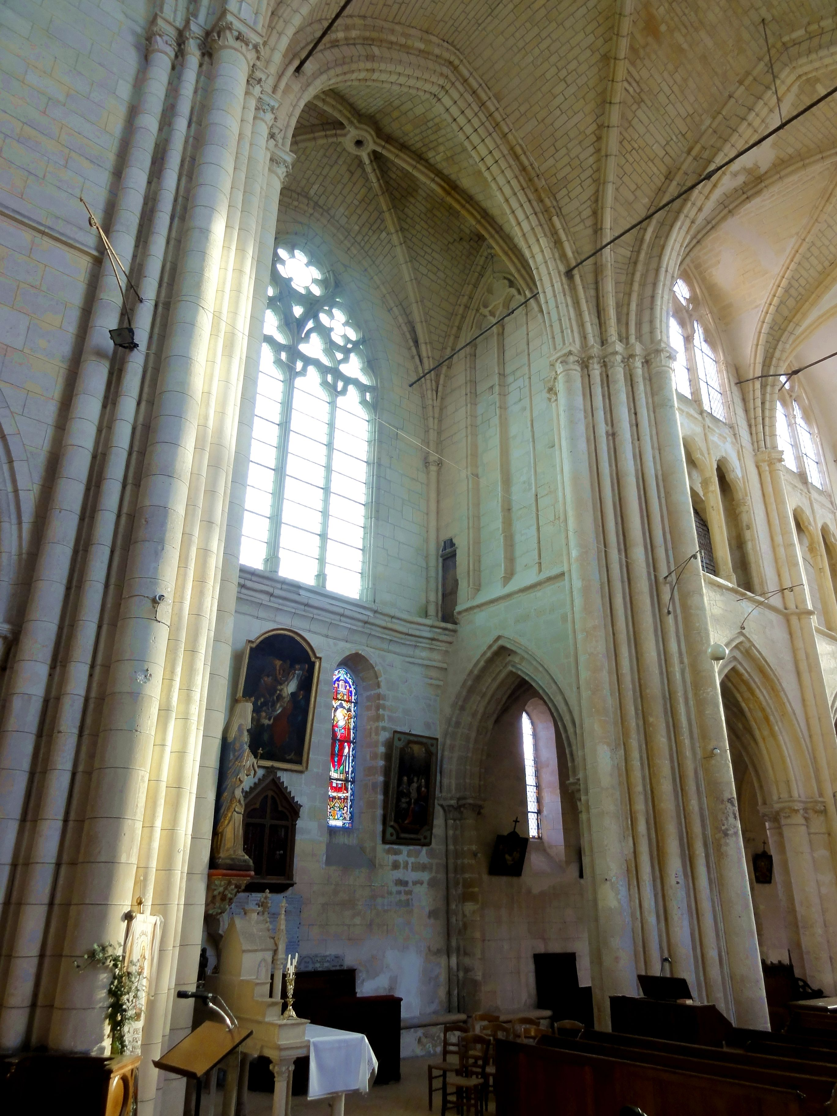 Croisillon sud.